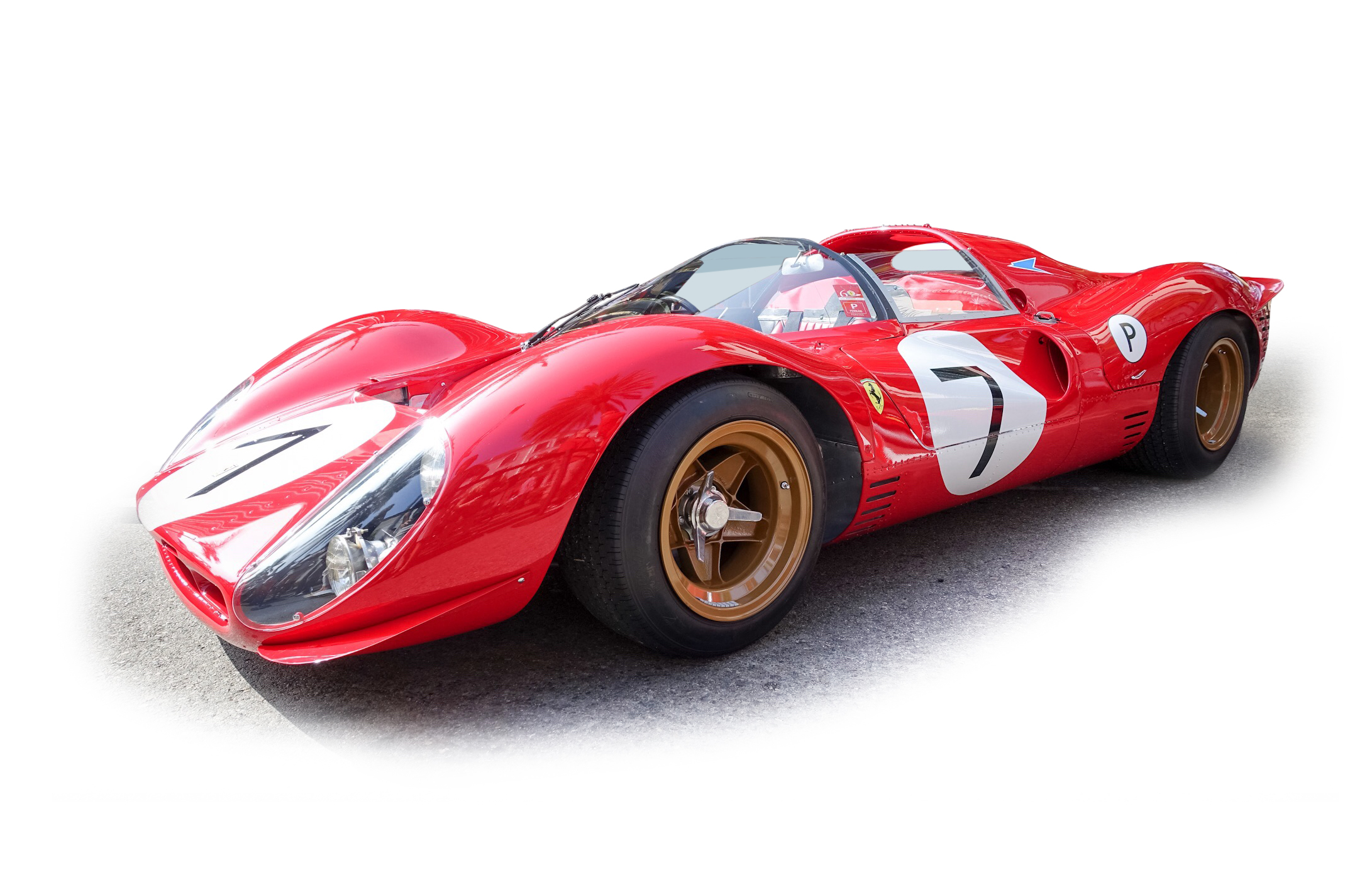 Ferrari 330 P4 (Frontansicht / Frontview)